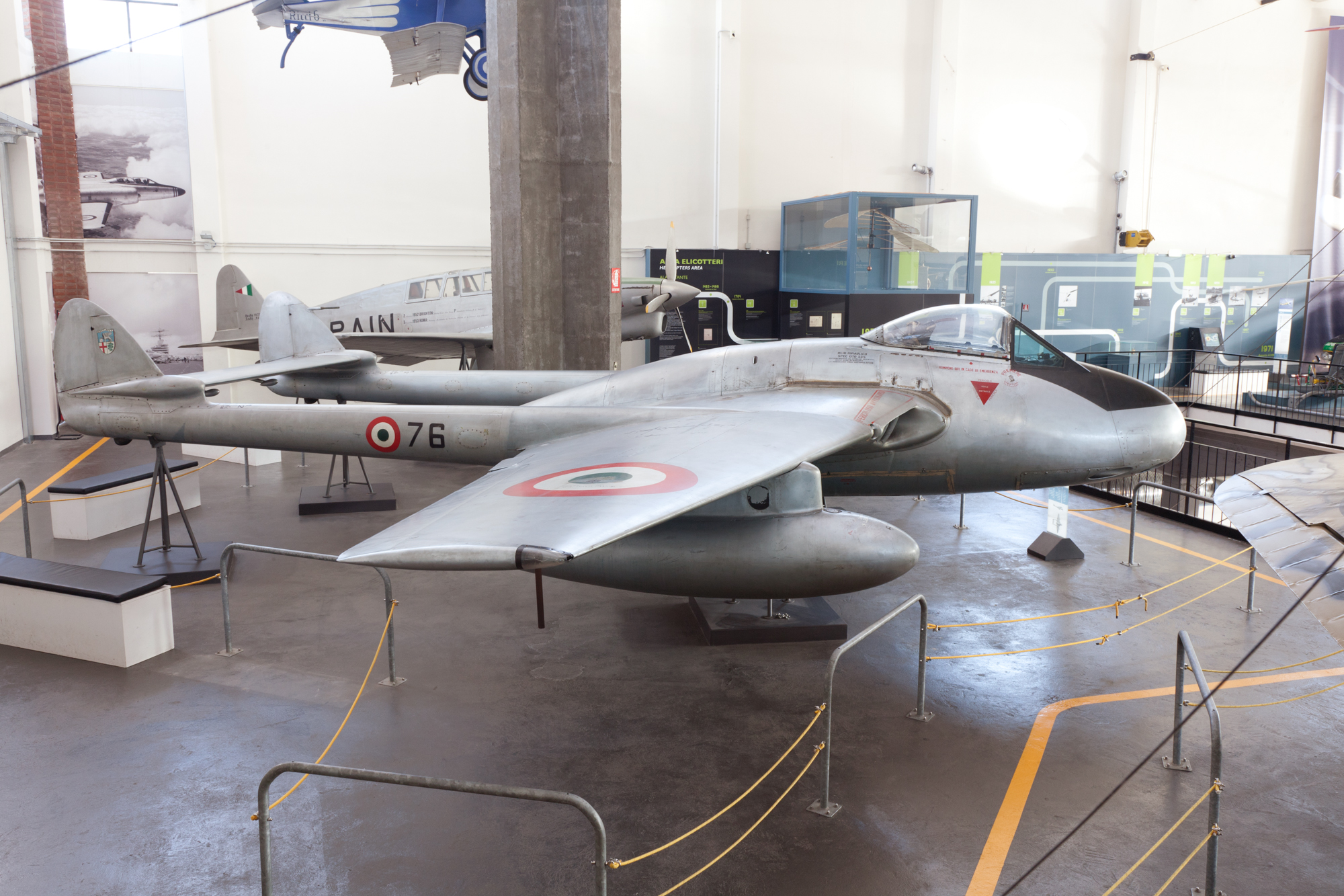 Caccia monomotore Macchi DH 100 Vampire, esposto al Museo nazionale della scienza e della tecnologia Leonardo da Vinci di Milano.